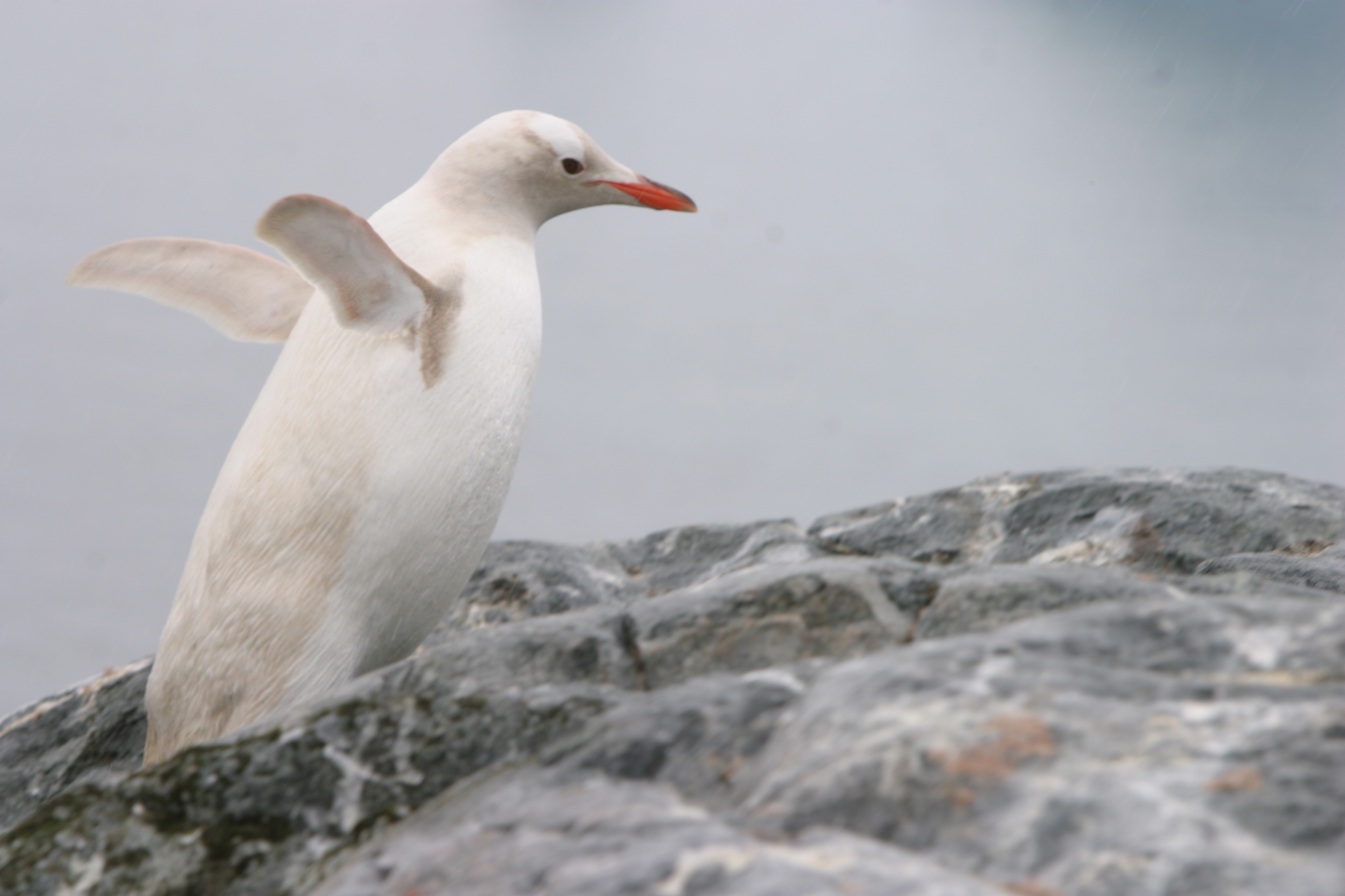 la magia de la naturaleza